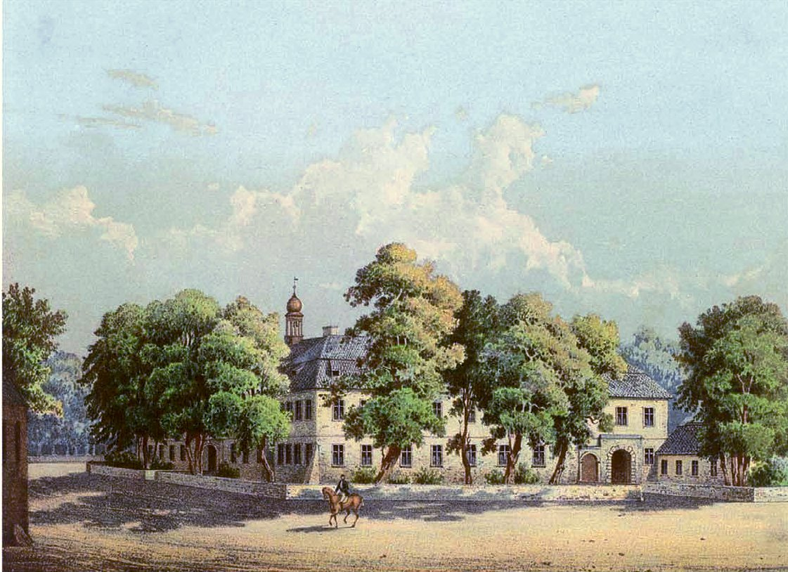 Schloss Langenbielau, Kreis Reichenbach, Provinz Schlesien